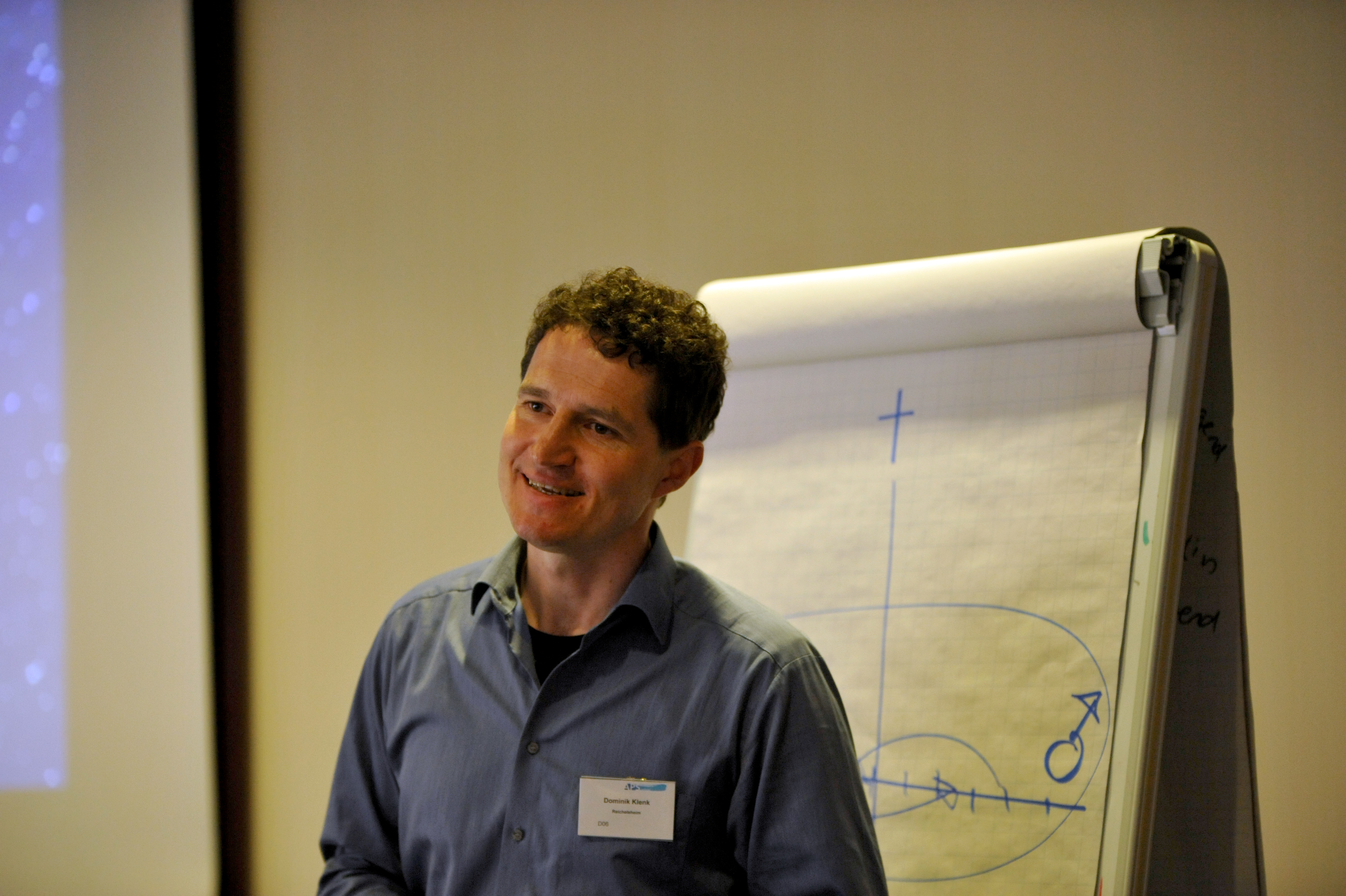 Dominik Klenk, Verlagsleiter des Brunnen Verlags Basel, beim Vortrag über Gender Mainstreaming auf dem 7. Internationalen APS-Kongress in Würzburg